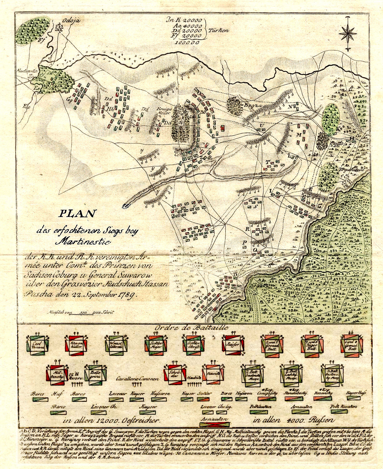 Râul Râmnic este un afluent al Siretului-ului din România. Una dintre cele mai cunoscute bătălii ale războiului ruso- turc (1787 - 1791) a avut loc aici - în apropierea satului Mărtinești). Rușii și austrieci au luptat împotriva unei armate turce de aproape 4 ori superioare. Forțele coaliției câștigă. Comandanții erau prințul de Coburg și Generalul Alexander Suworow. Sub hartă, explicații despre ceea ce se întâmplă în germană.